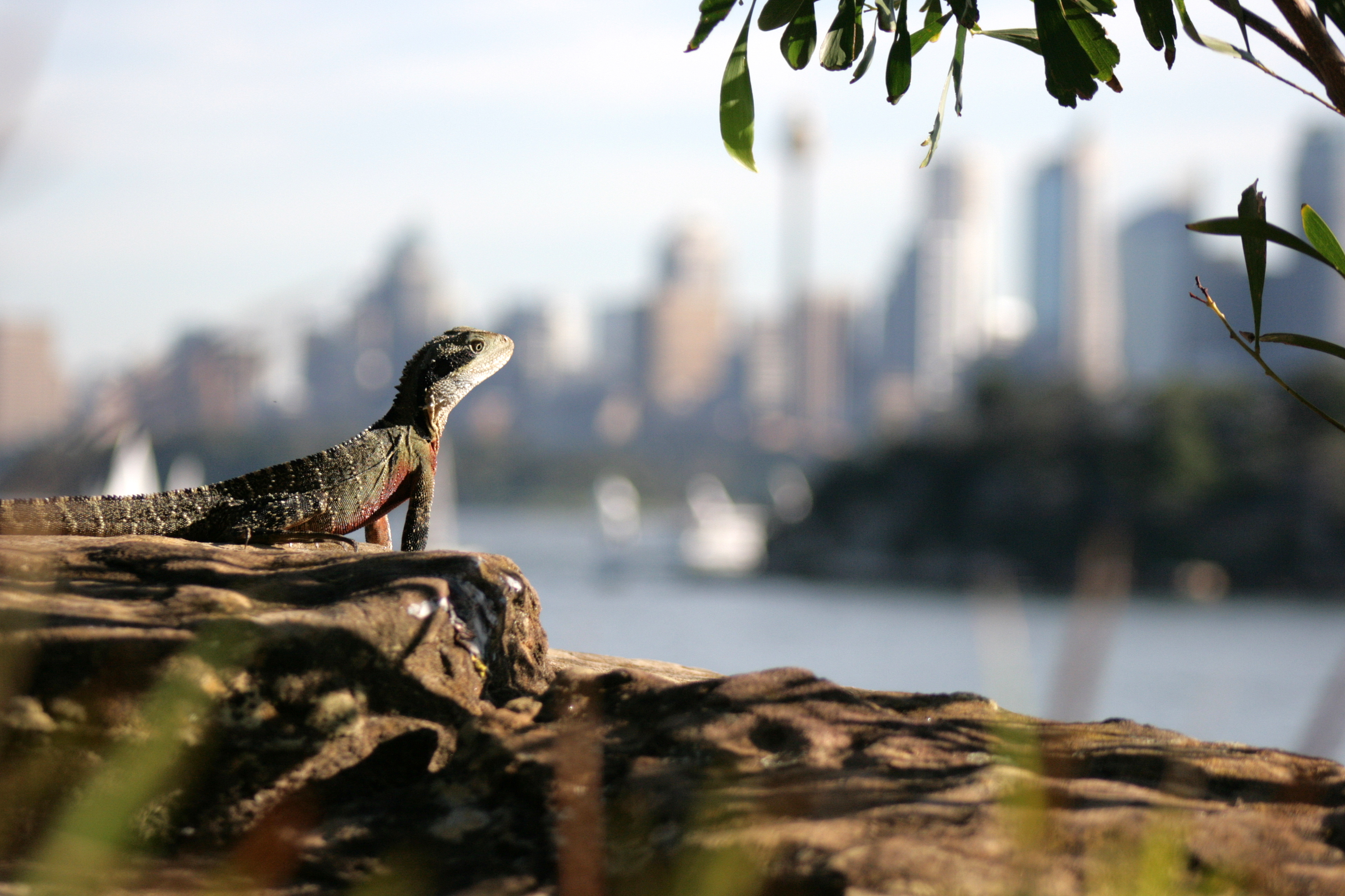 Physignathus lesueurii lesueurii